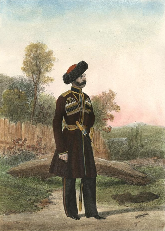 Казак конно-артиллерийских батарей Черноморского Казачьего войска. 1840-1845.